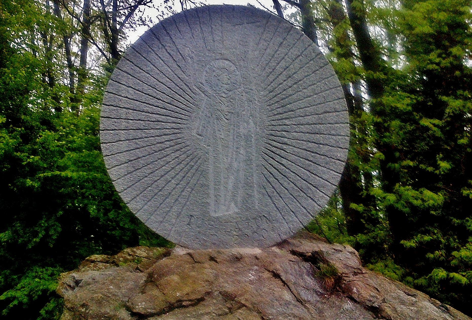 Via Crucis Sant'Ambrogio di Torino-San Pietro: XV° Stazione "La Resurrezione" Jubilaeum A.D.2000